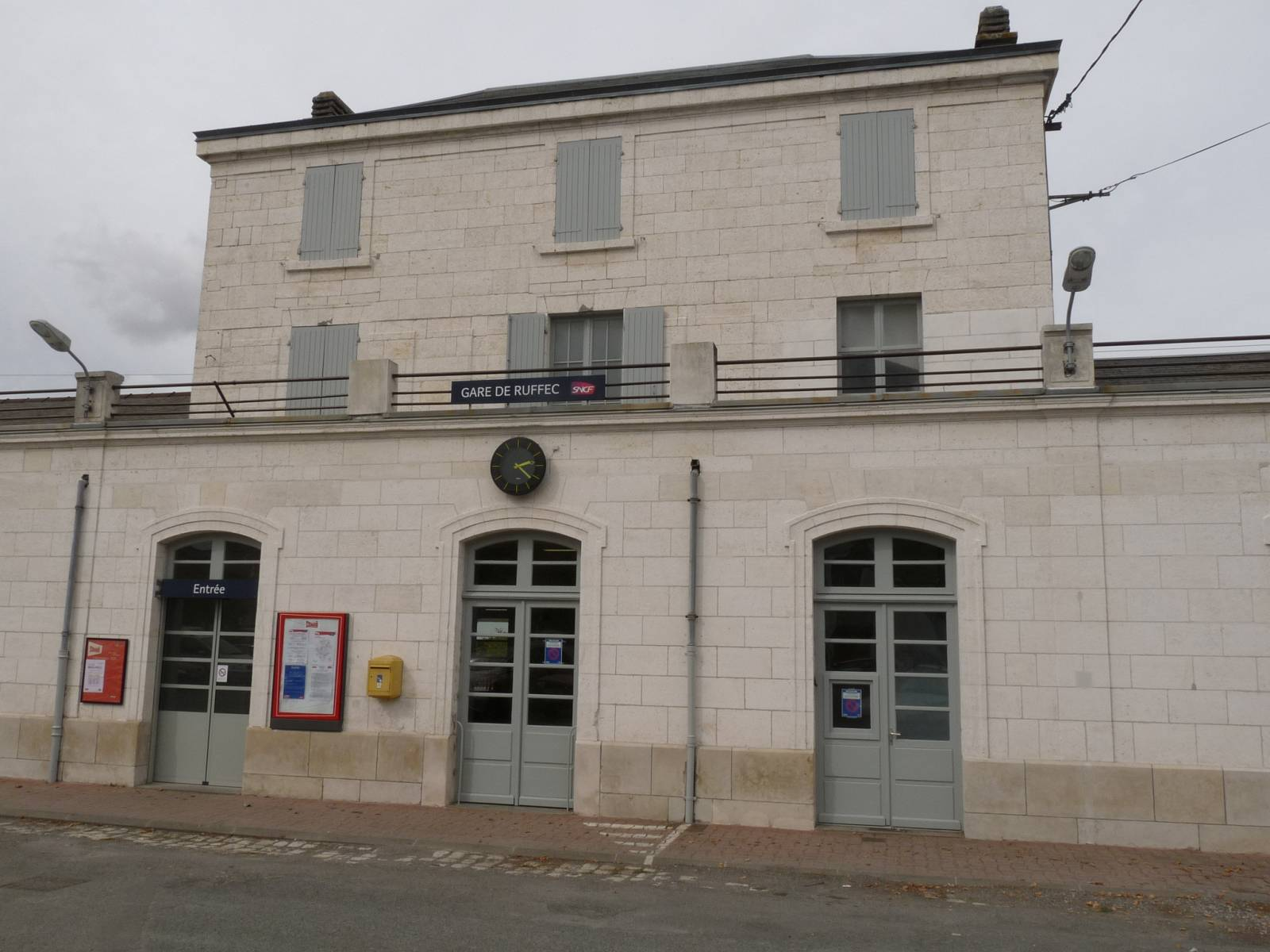 Gare de Ruffec, Charente, France